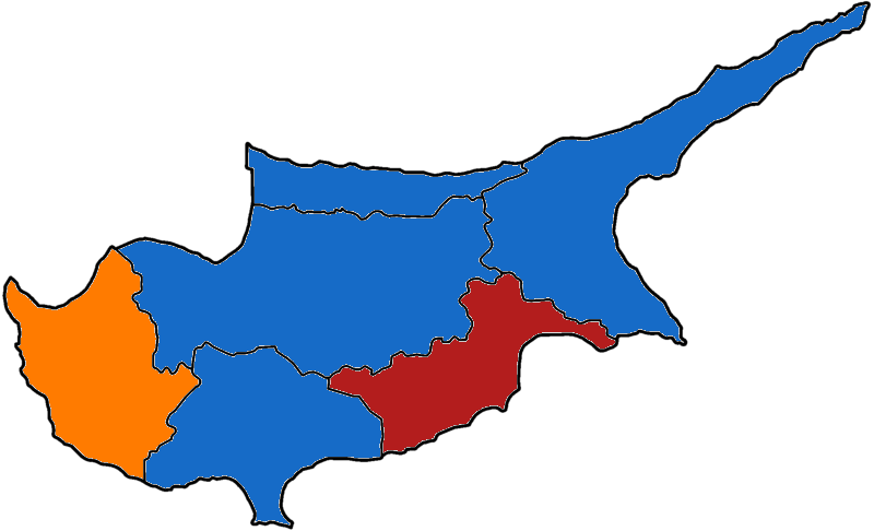 Αποτελέσματα βουλευτικών εκλογών 2016 ανά επαρχία